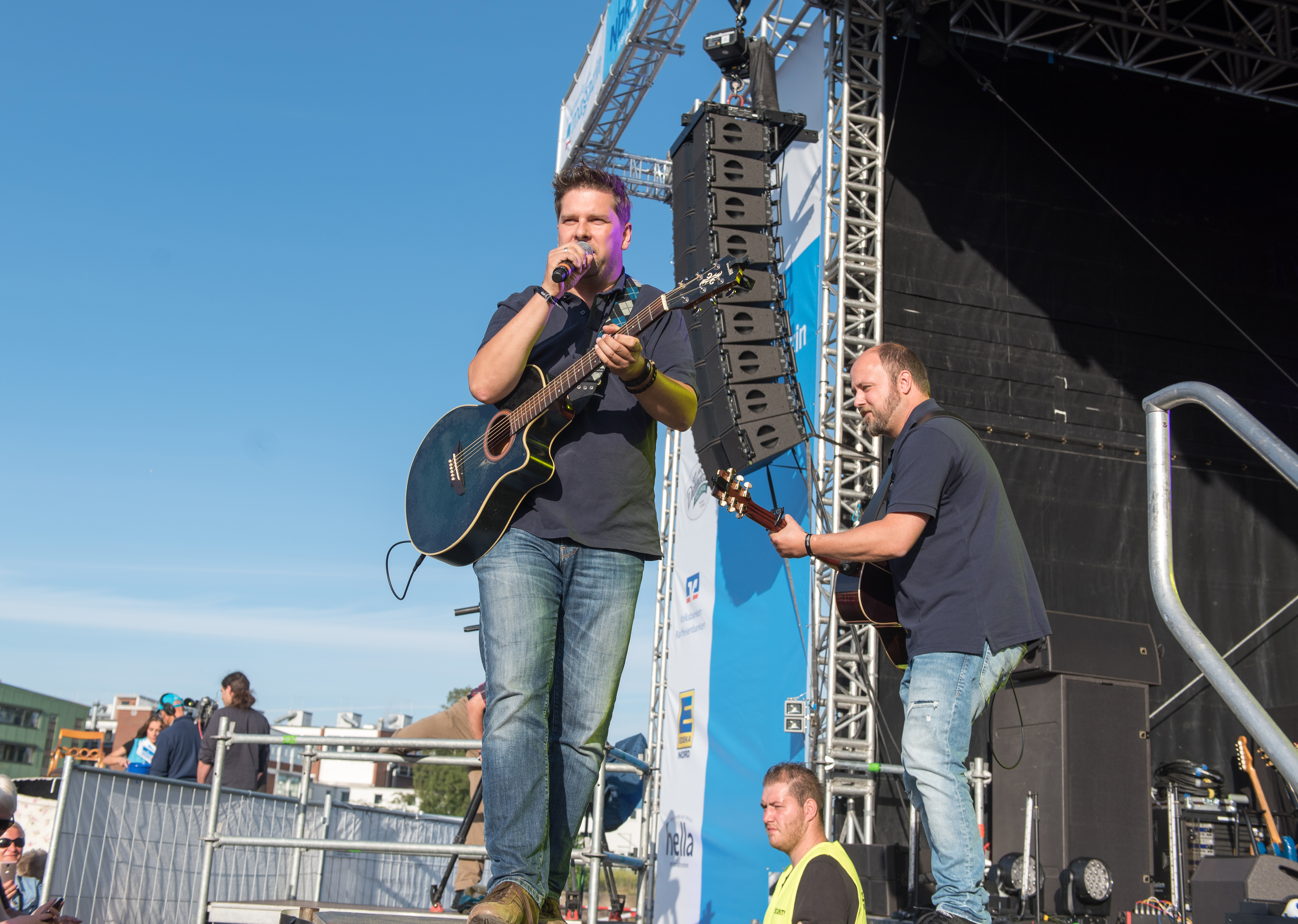 Duo Röschmann Brandau beim Global Citizen Festival in Hamburg